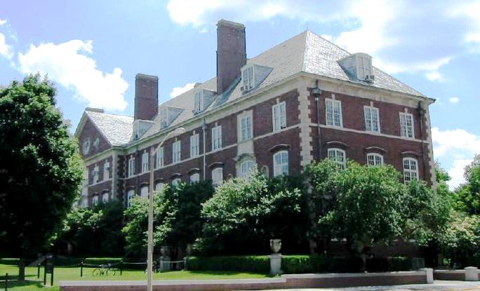 David Kinley Hall